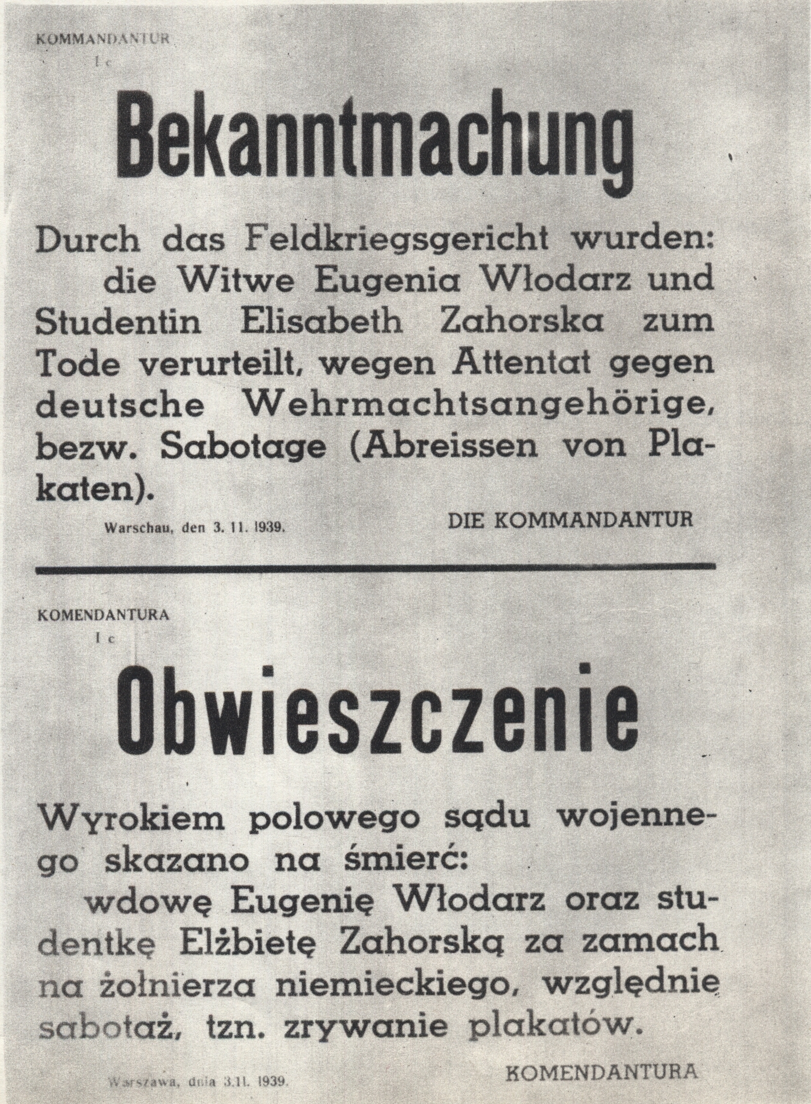 Niemieckie obwieszczenie o wyroku kary śmierci za zrywanie plakatów.